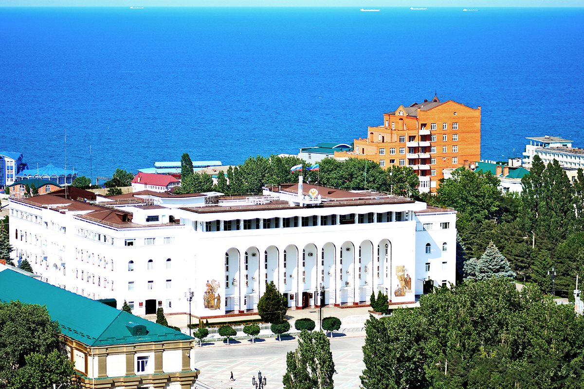 Дом Правительства Республики Дагестан Авар: Дагъистан Жумгьурияталъул хІукуматалъул рукъ